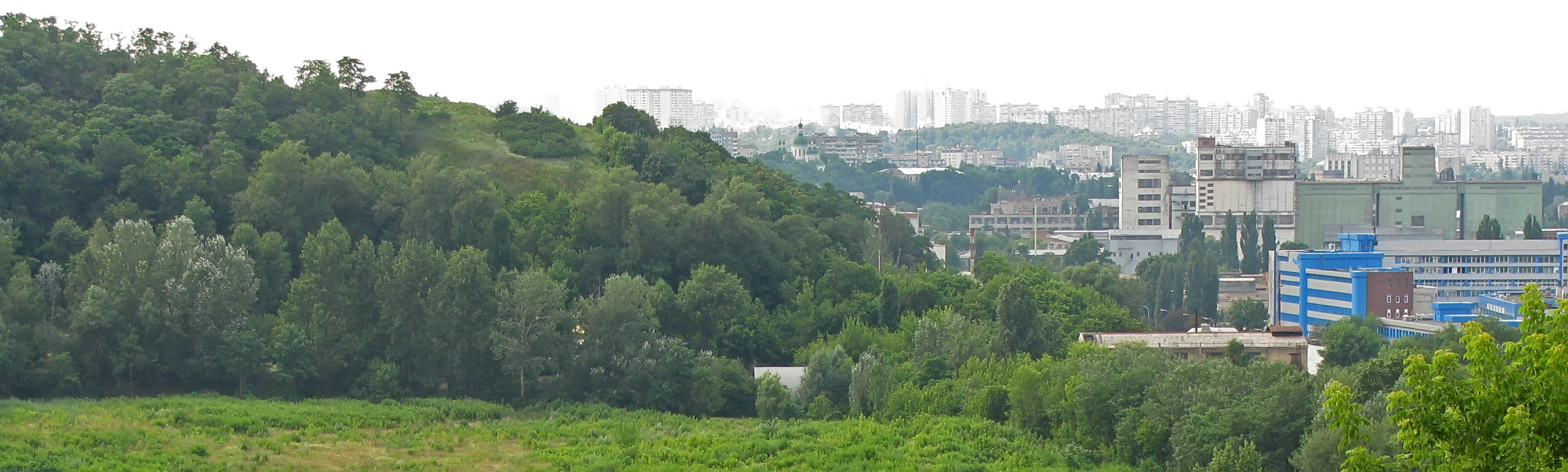 Кирилівська стоянка первісних людей епохи палеоліту, Київ, Фрунзе вул., 59-61